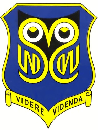 Heraldisktvapen för Flygvapnets underrättelseskola